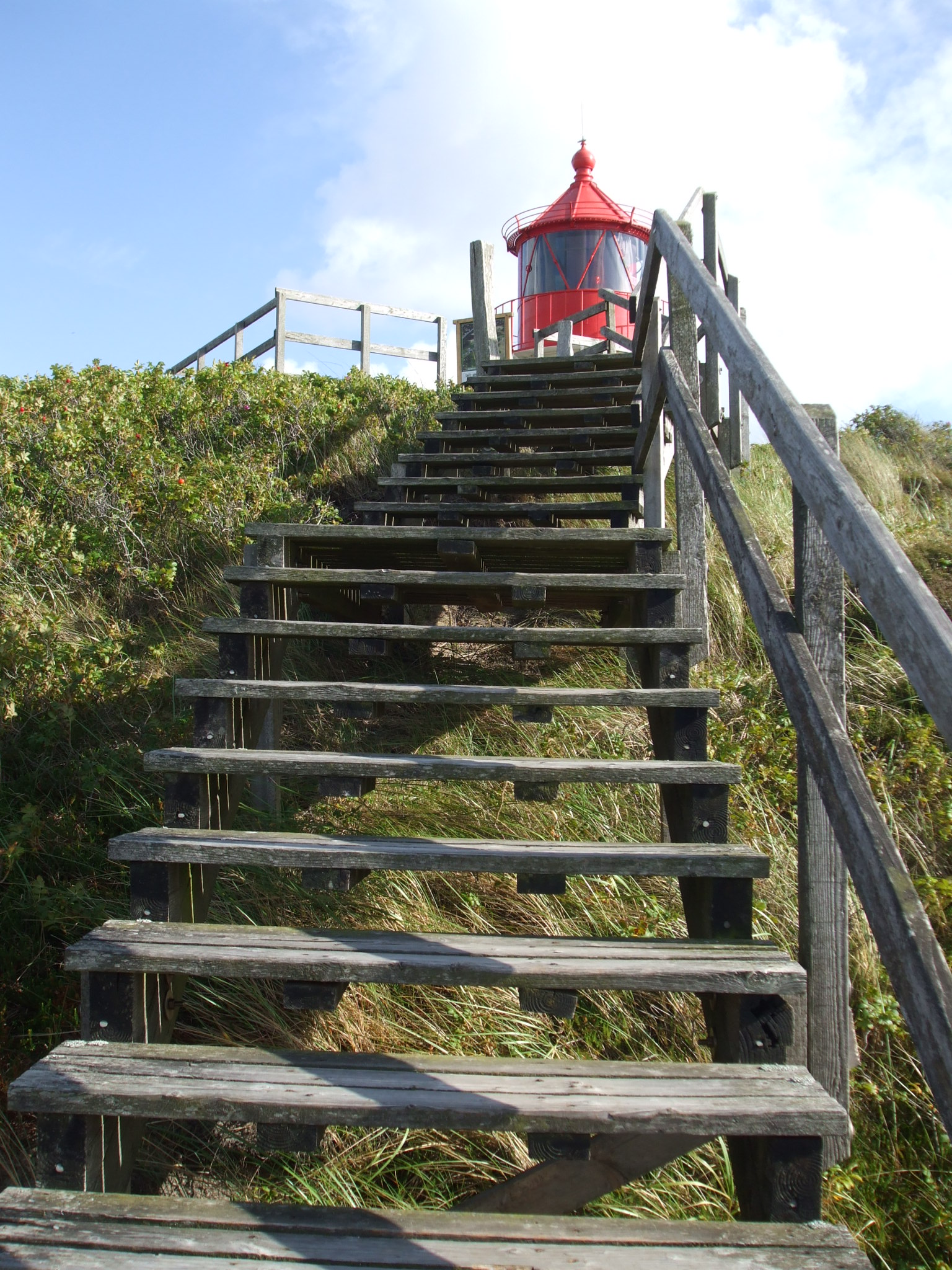 Quermarkenfeuer auf Amrum